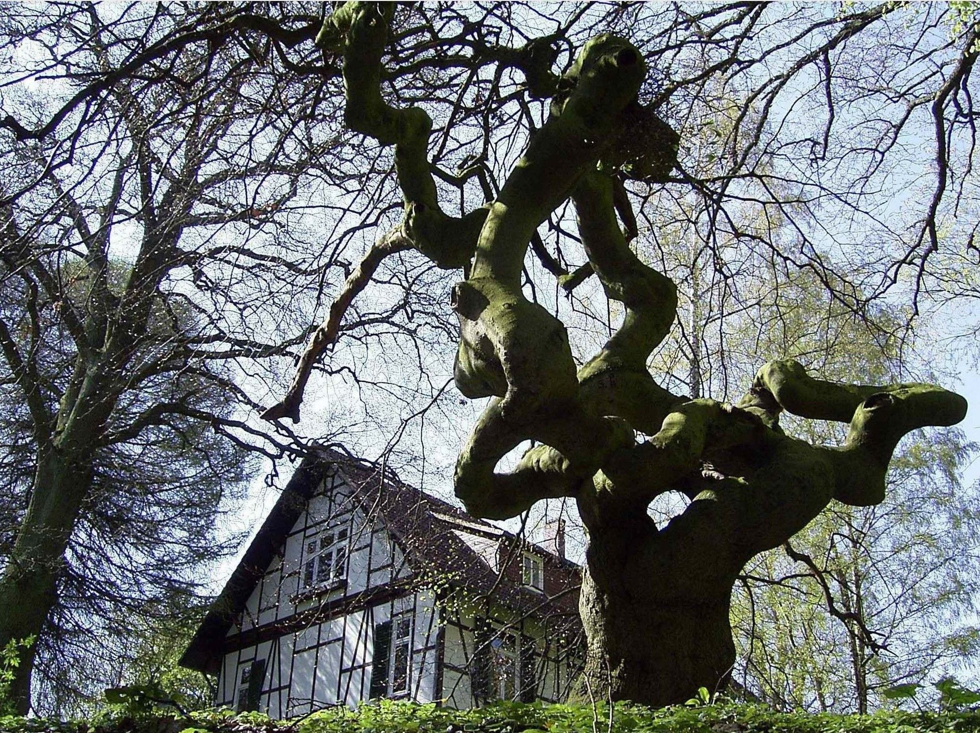 Süntelbuche am Freizeitheim „Haus Süntelbuche“ in Bad Münder am Deister